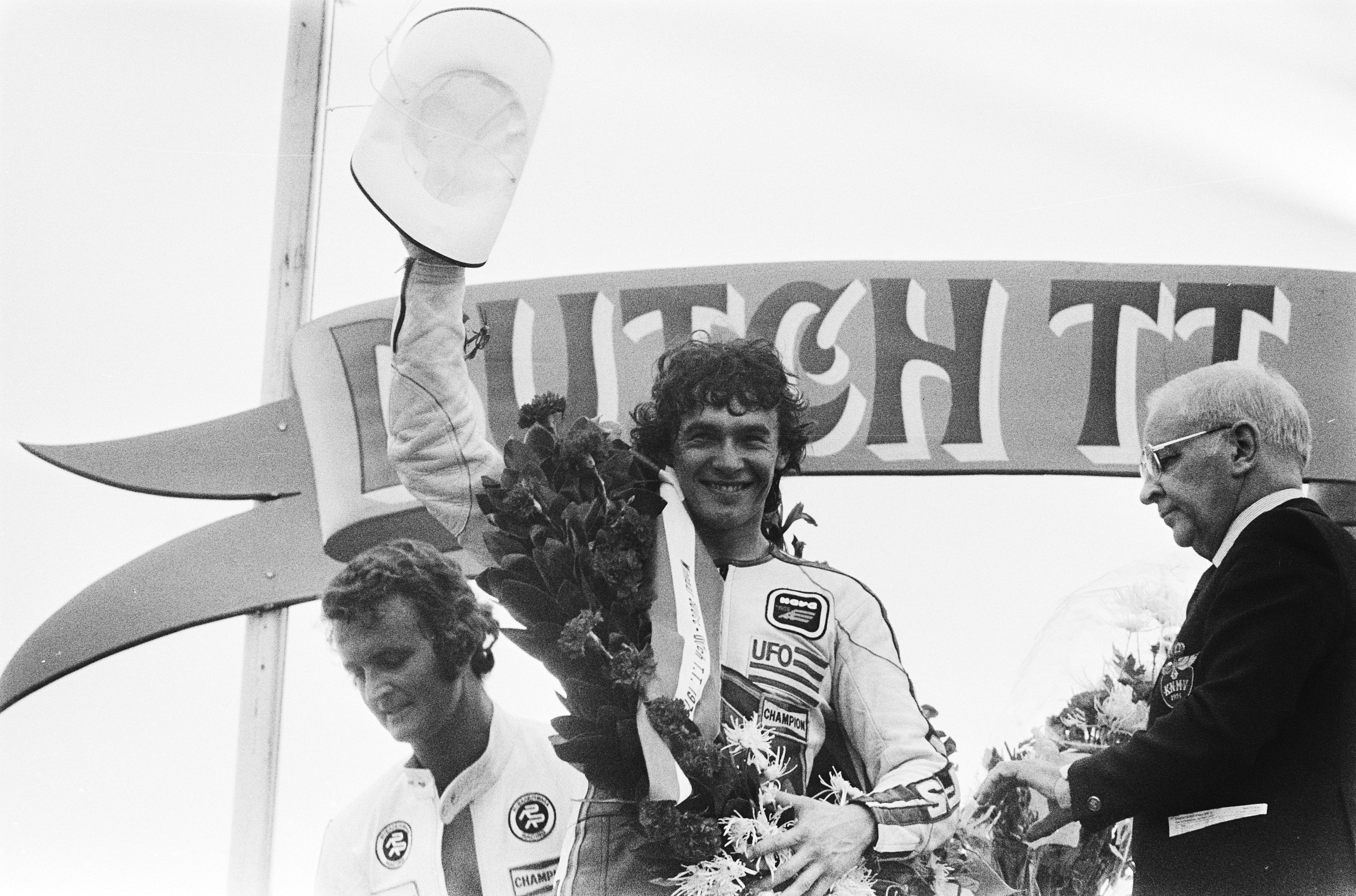 Collectie / Archief : Fotocollectie Anefo Reportage / Serie : TT Assen 1979 Beschrijving : TT Assen. 500cc klasse. Huldiging van winnaar Virginio Ferrari en Wil Hartog (links) Datum : 23 juni 1979 Locatie : Assen, Drenthe Trefwoorden : huldigingen, motorcoureurs, motorfietsen, motorsport, motorsport, races Persoonsnaam : Ferrari, Virginio, Hartog, Wil Fotograaf : Bogaerts, Rob / Anefo Auteursrechthebbende : Nationaal Archief Materiaalsoort : Negatief (zwart/wit) Nummer archiefinventaris : bekijk toegang 2.24.01.05 Bestanddeelnummer : 930-3292